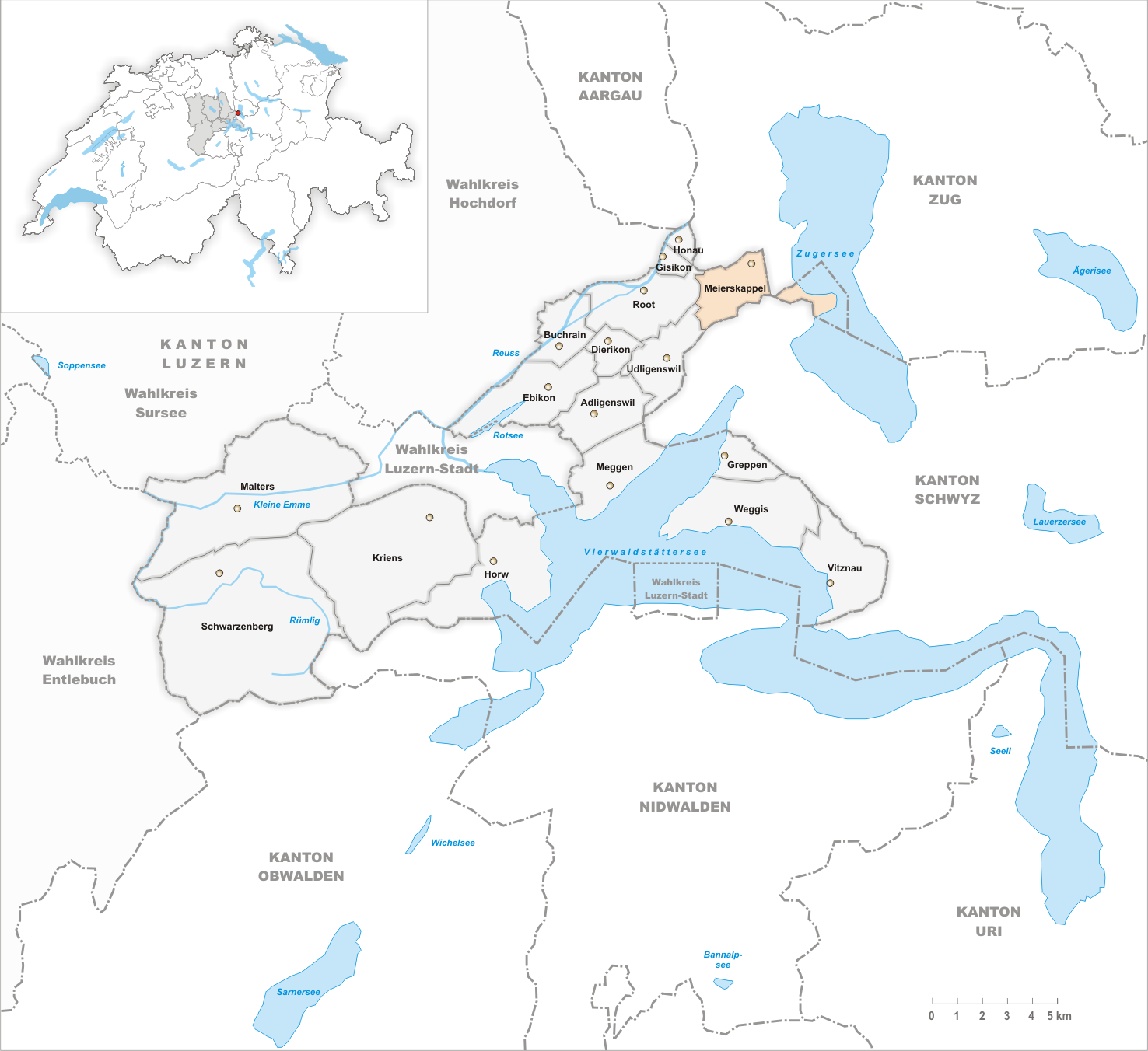 Municipality Meierskappel